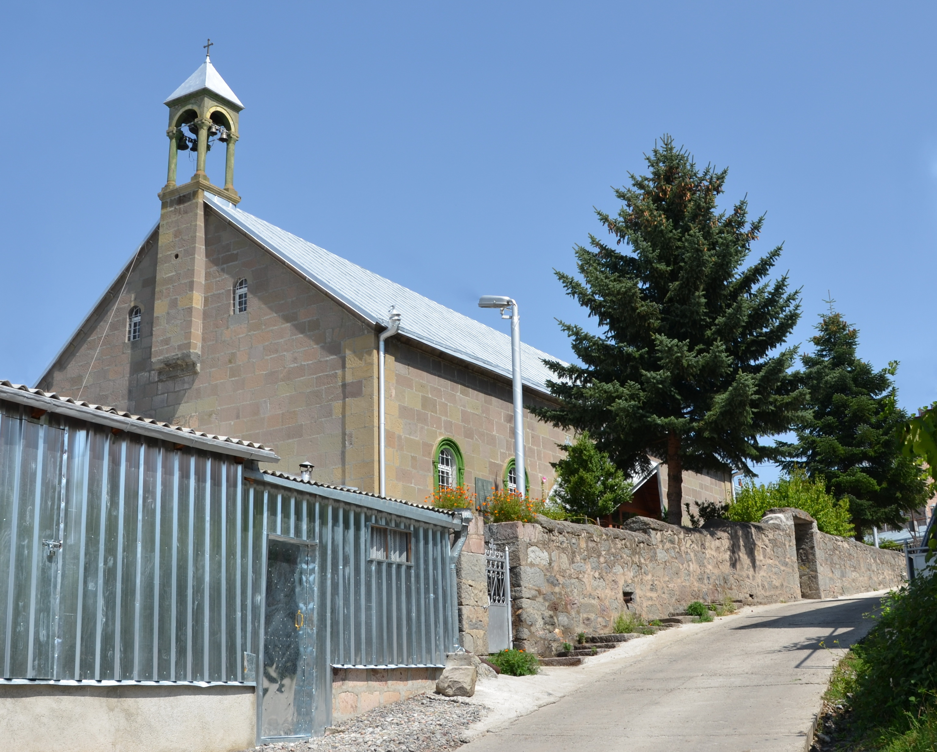 Հիսուս Փրկիչ քարաշեն եկեղեցի, կառուցվել է 1881-1886 թթ.